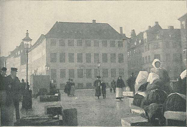 Assistentshuset set fra Gammelstrand omkring år 1900